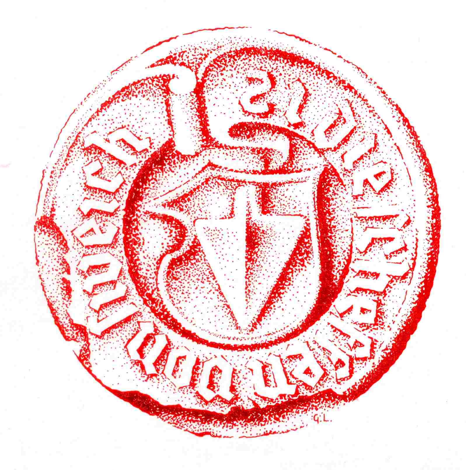 Das Gerichtssiegel der Schultheißerei Schweich von 1478 trägt die Umschrift: SI(egel) DIE SCHEFFEN VON SWEICH, vgl. Artur Gemmel, Chronik von Schweich, 1984.